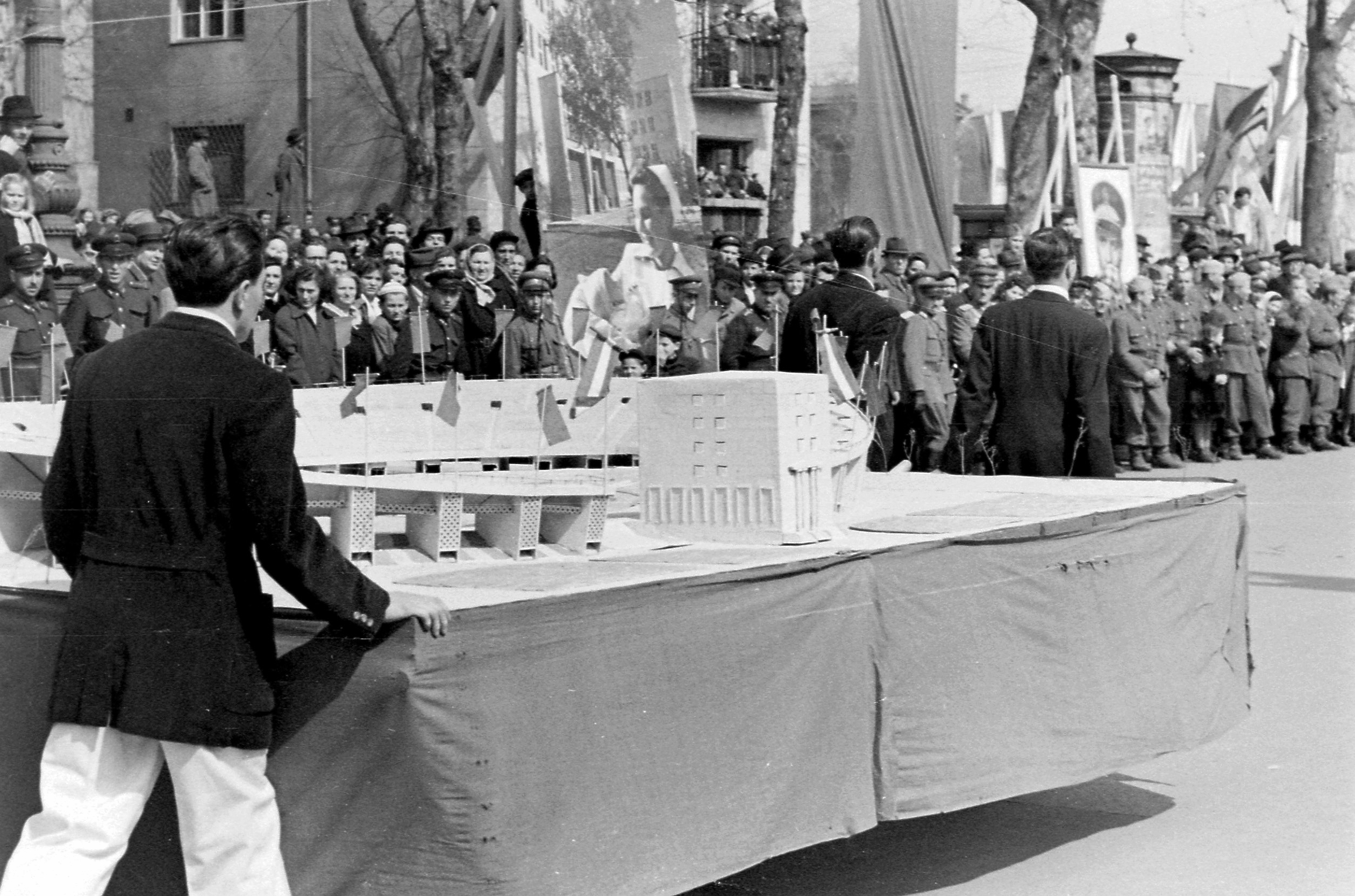 Népstadion makettje, 1952. április 4. Andrássy (Sztálin) út, a Hősök terénél